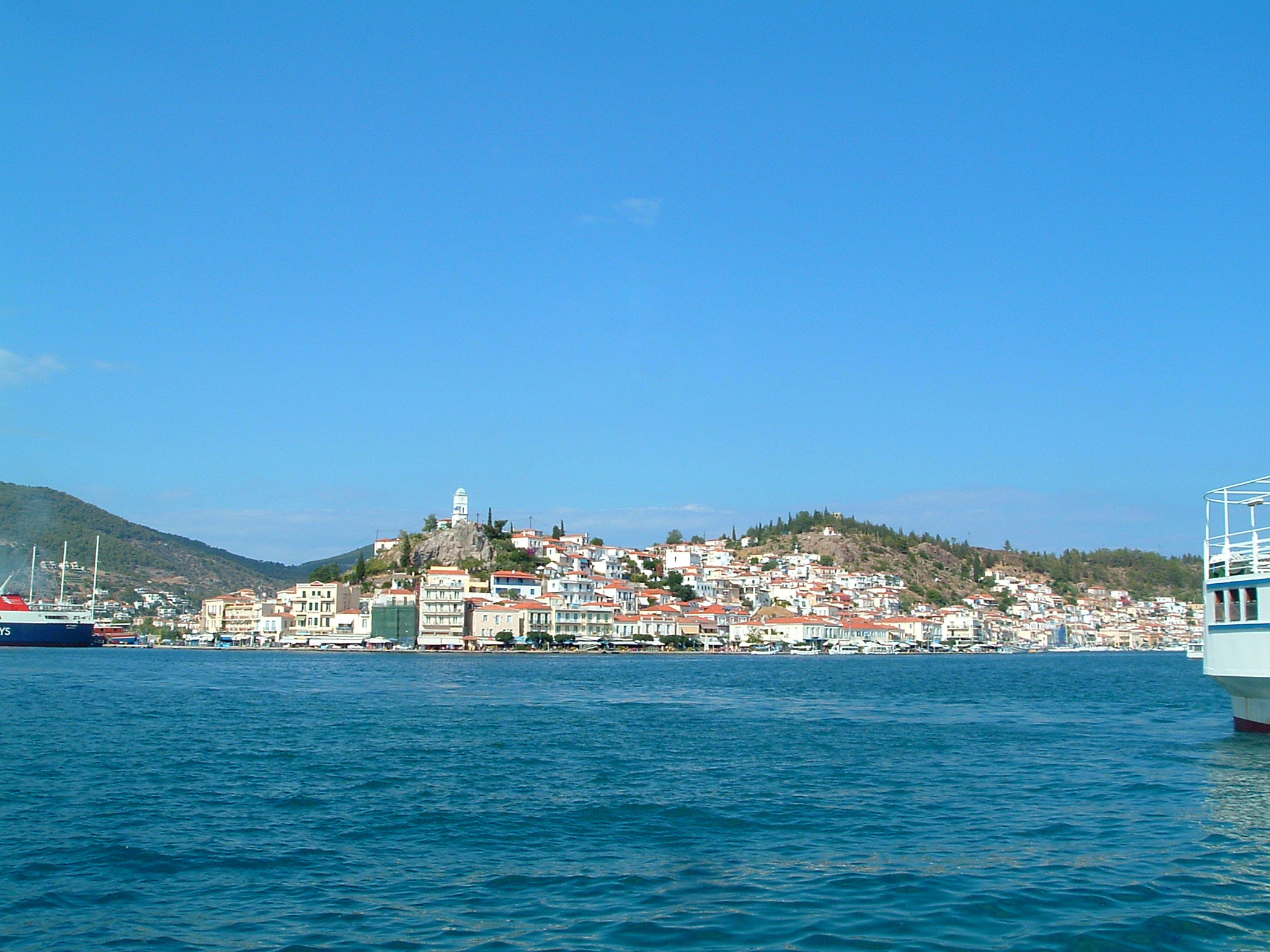 Greek island Poros